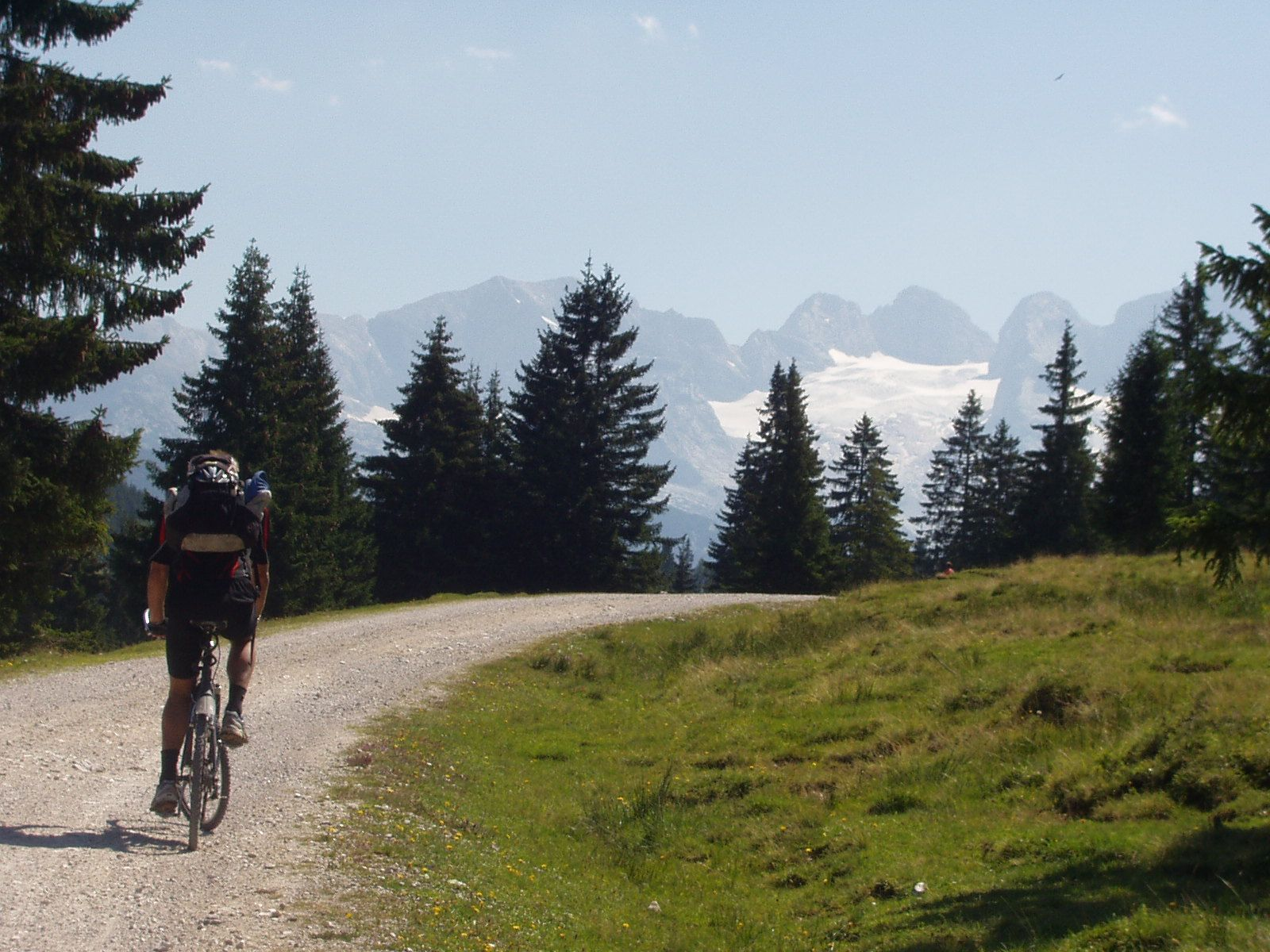 Dachstein glacier Photograph by Gakuro